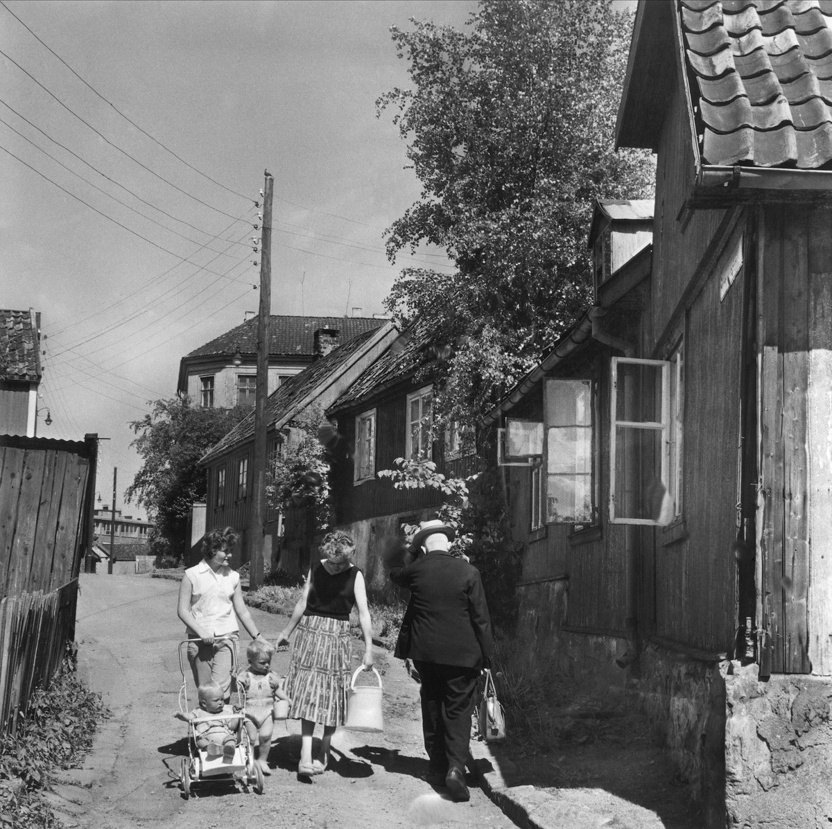 Utenfor Flisberget 4, med Stupinngata i bakgrunnen. Foto: Ukjent/Oslo Museum.